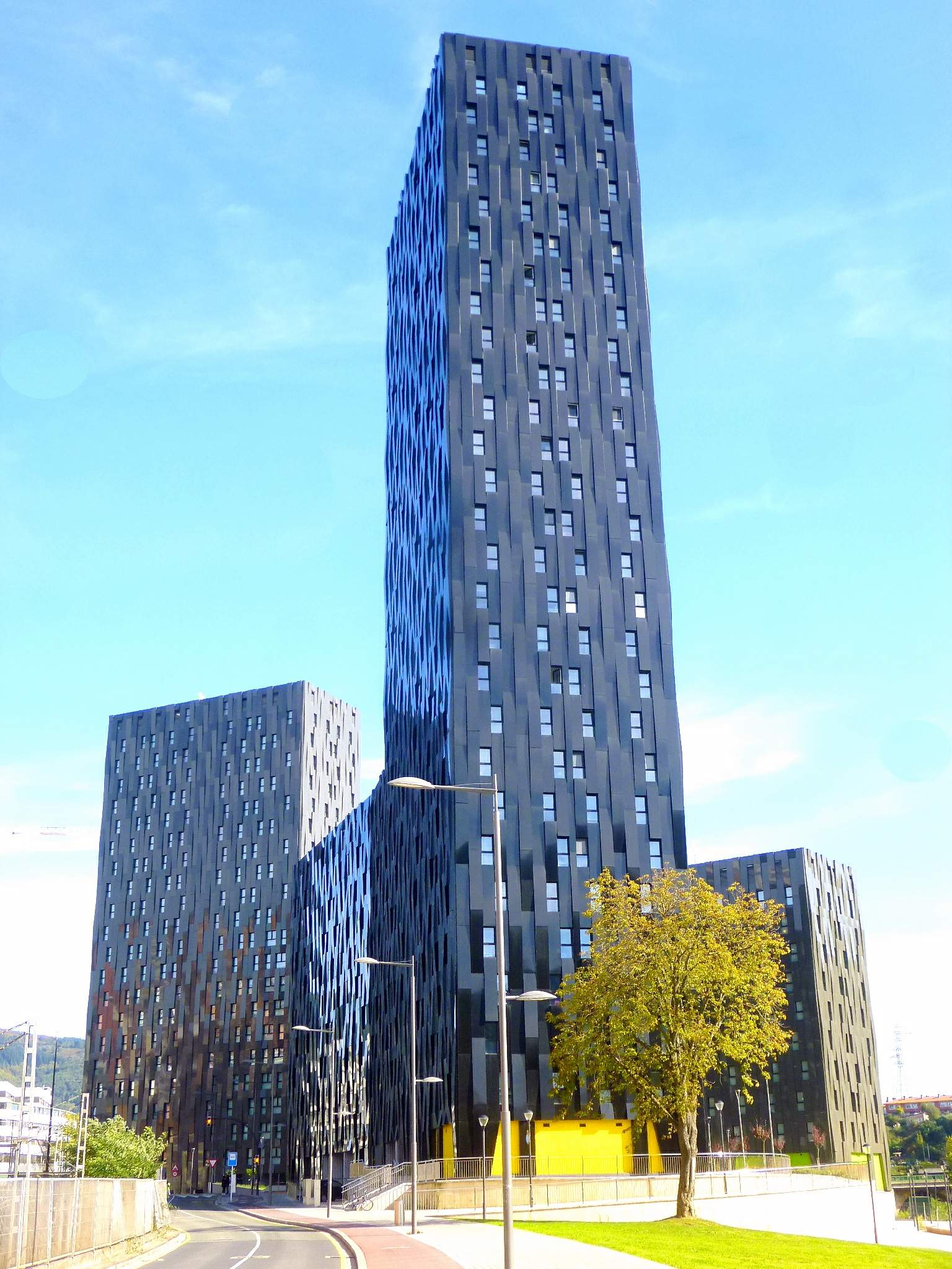 Torres de Bolueta (Bilbao)